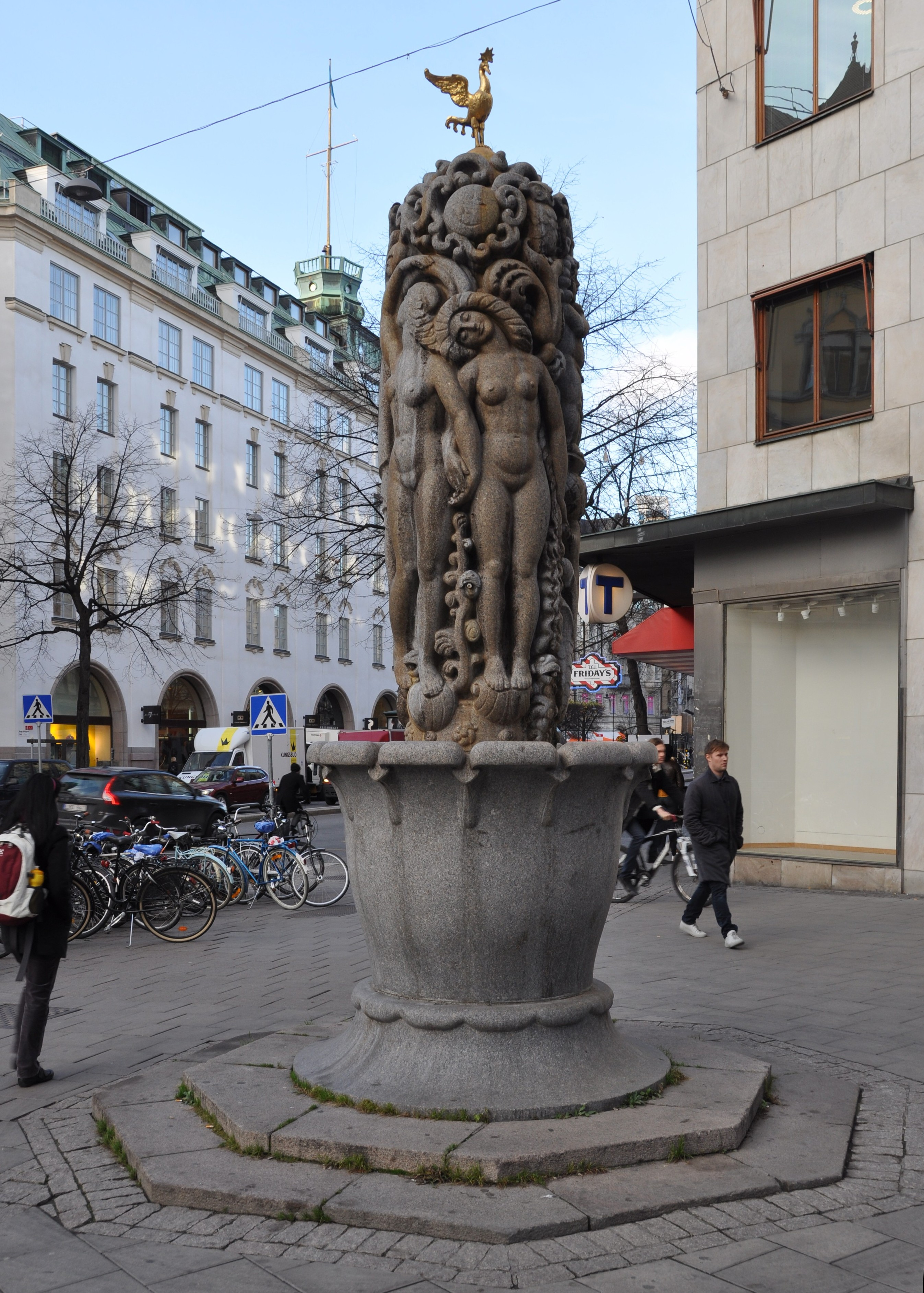 Carl Eldhs fontän, rest 1921